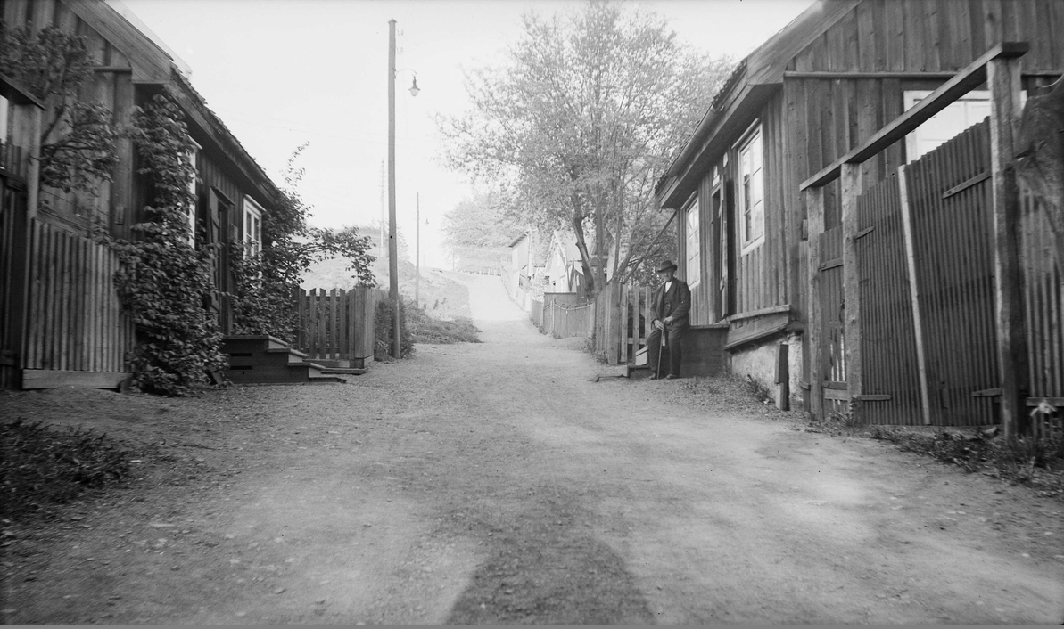 Portstuer for Tøyen hovedgård i Tøyenparken, langs det som var Heibergs gate, sett fra Økernveien. Foto: Fritz Holland, mars 1939. Fra Byhistorisk samling hos Oslo museum.